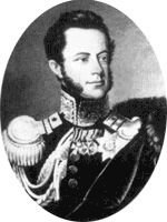 Willem hertog van Nassau